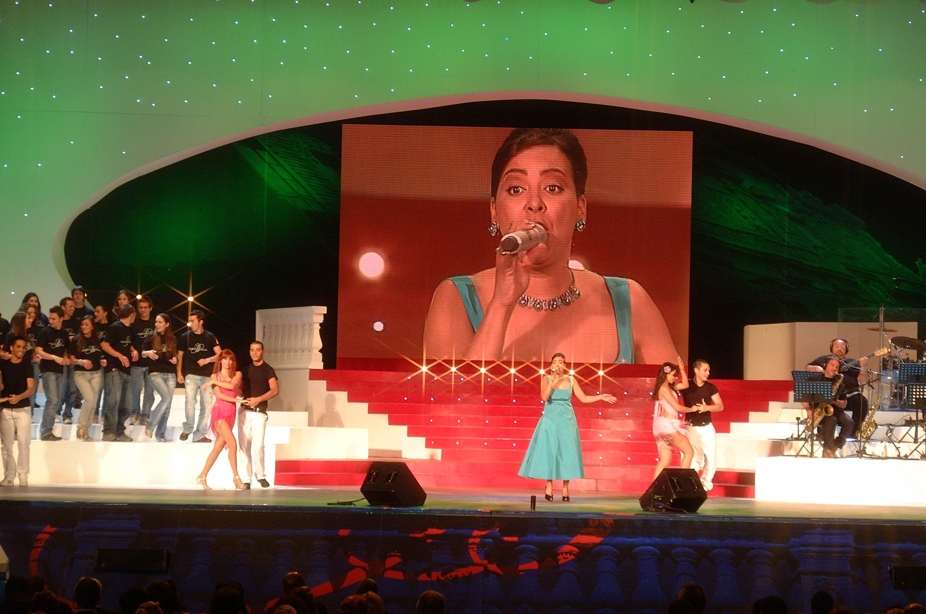 Mariblanca artista invitada al Premio Barroco Award